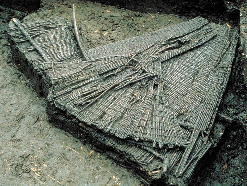 Deze visfuik is in 1978 opgegraven bij Bergschenhoek en is 6200 jaar oud